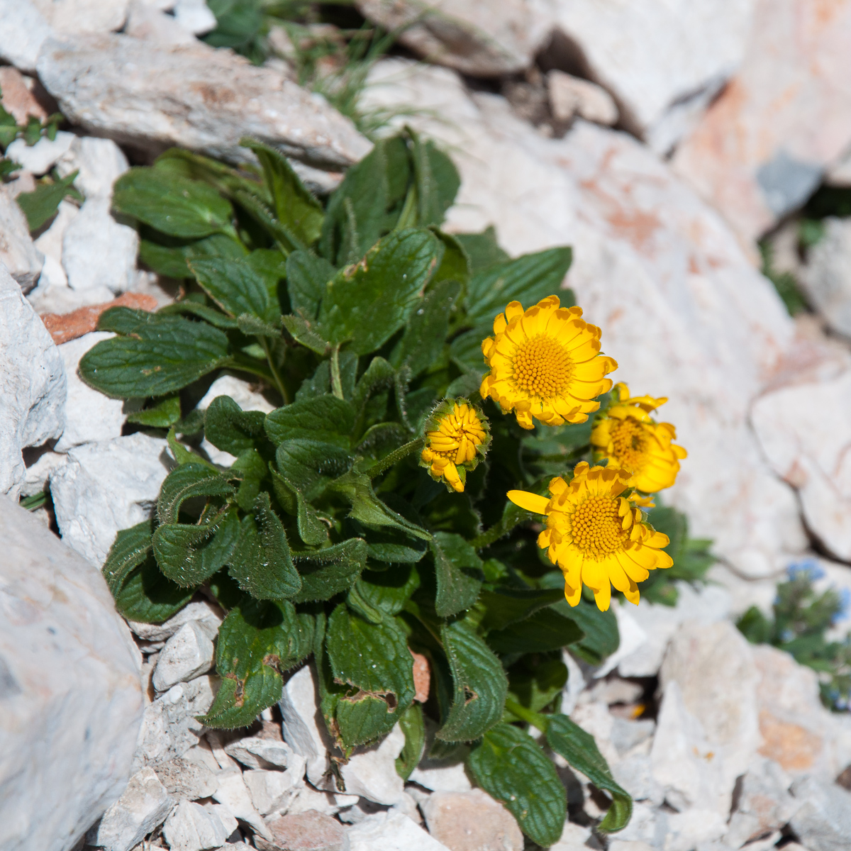 Doronicum glaciale in Slovenia